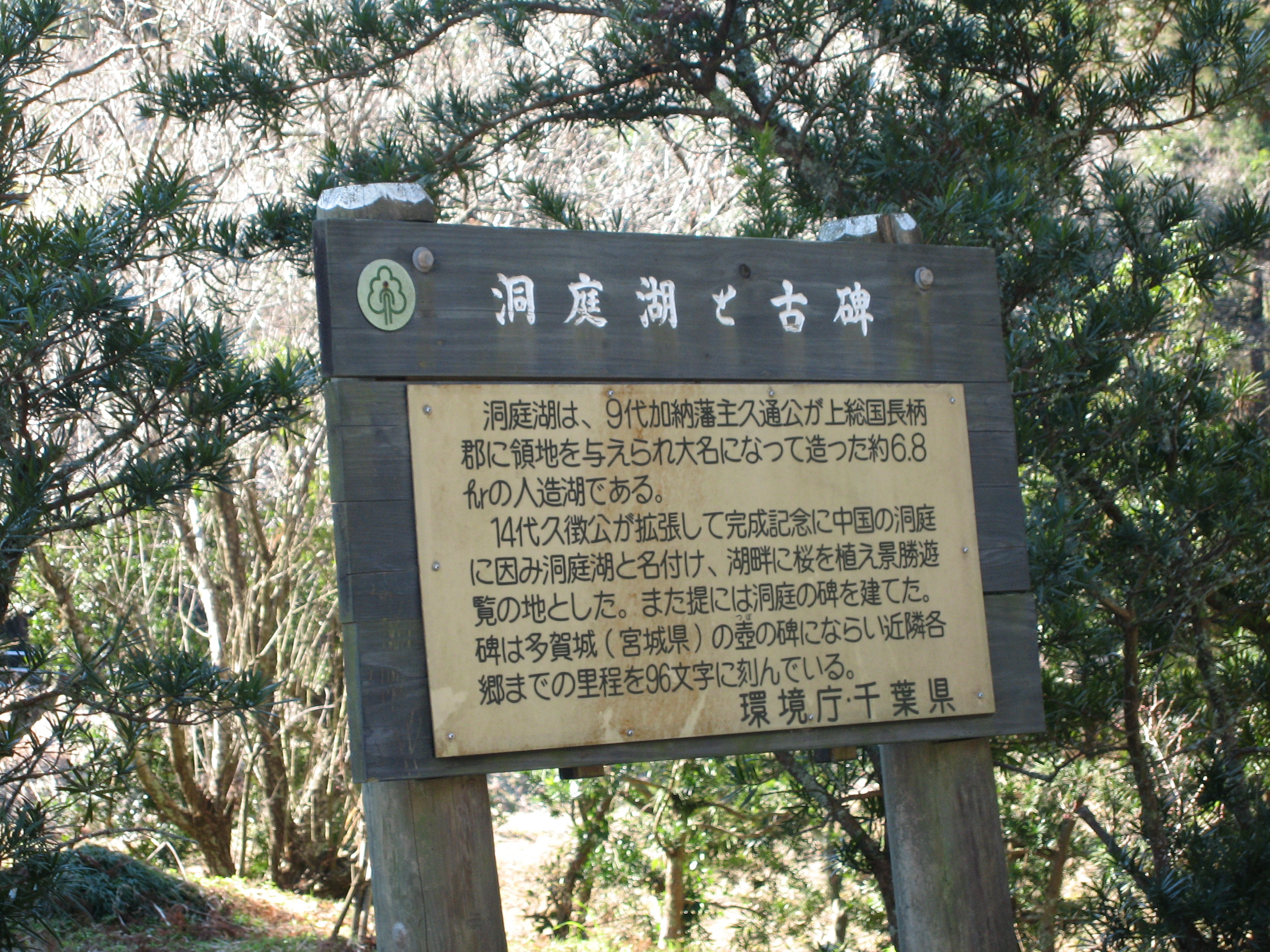 Douteiko Lake, Torami, Chiba, Japan, 洞庭湖（古碑）